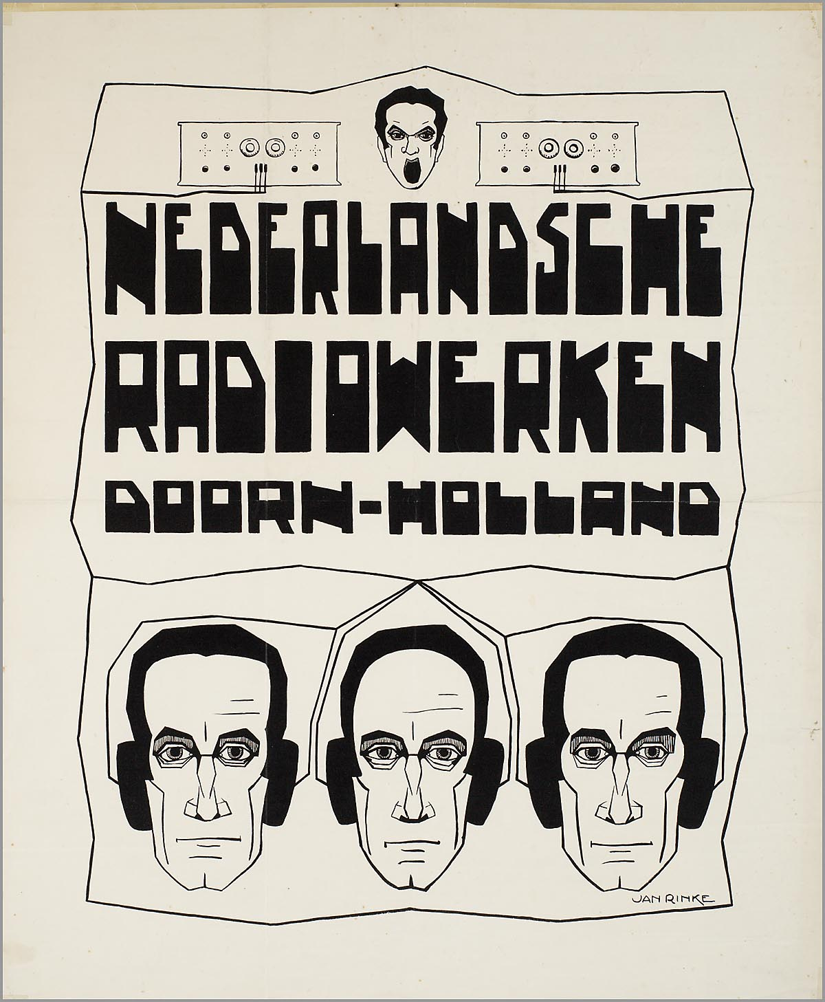 Affiche: Nederlandsche Radiowerken Doorn - Holland